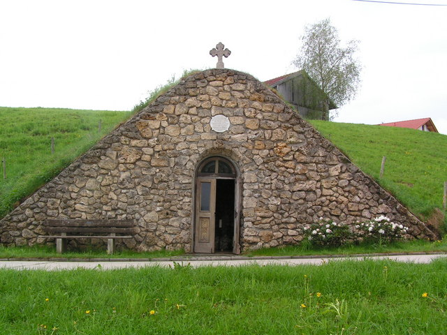 Klebhamer Kapelle, 19 km from Traunstein, Deutschland (Zone 33).